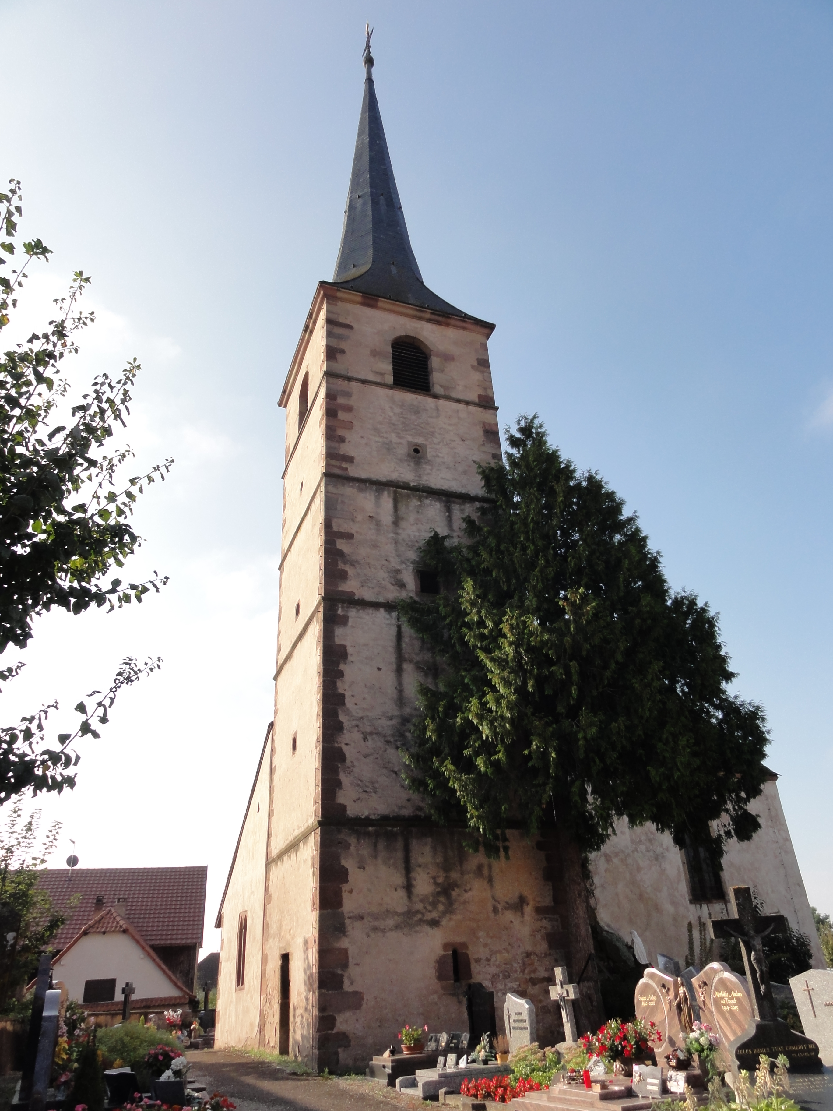 Alsace, Bas-Rhin, Meistratzheim, Ancienne église Saint-André (XIIe-XVIIIe), actuellement chapelle de cimetière: It is indexed in the Base Mérimée, a database of architectural heritage maintained by the French Ministry of Culture, under the references PA00084788 and IA00023868.